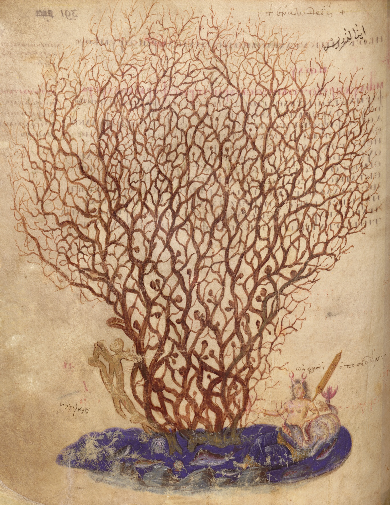 Bild einer Koralle im Wiener Dioskurides (Carmen de viribus herbarum, Blatt 391 verso). Korallen galten im Altertum als Pflanzen